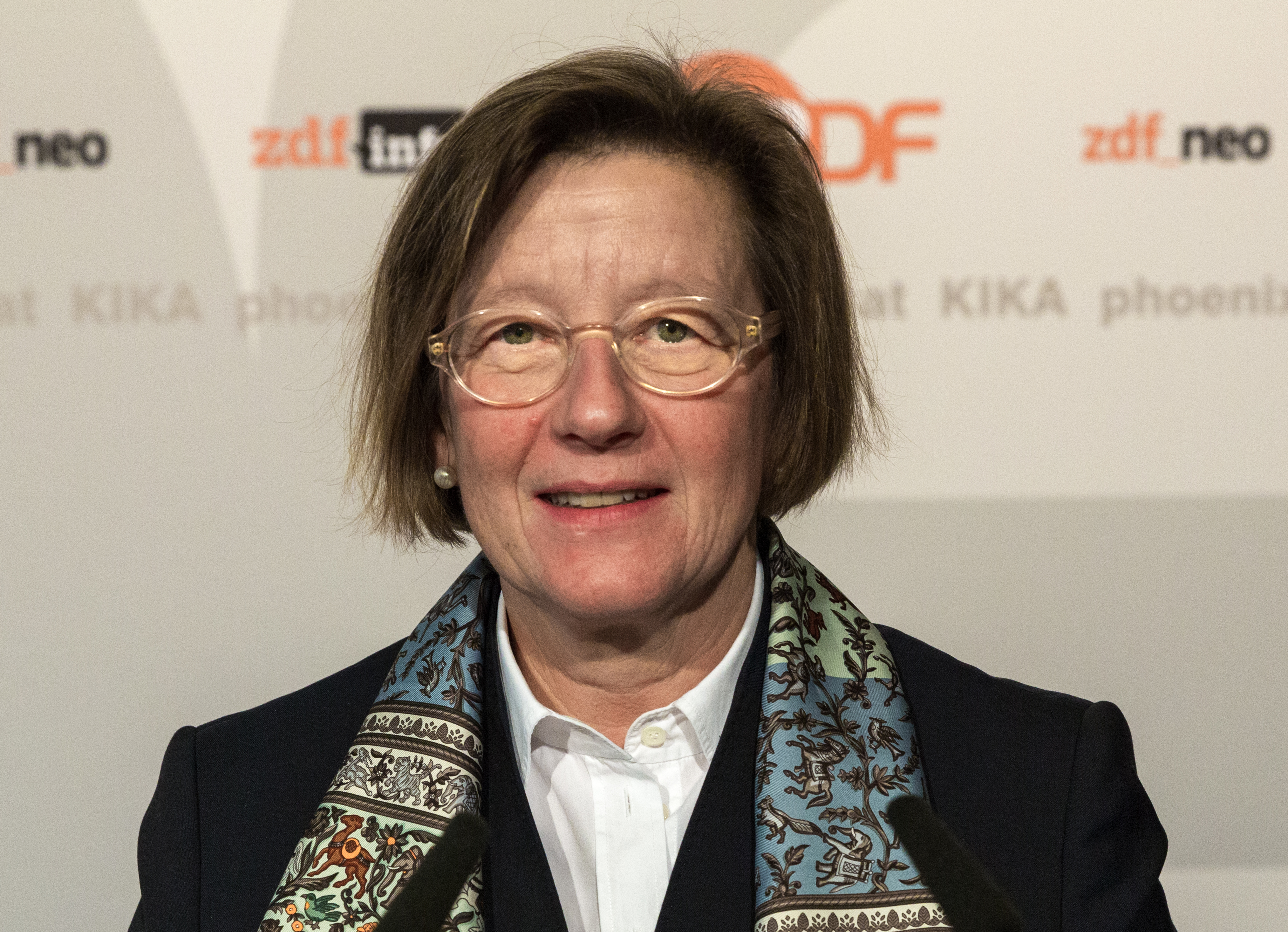 Marlehn Thieme, ZDF, Vorsitzende des Fernherates